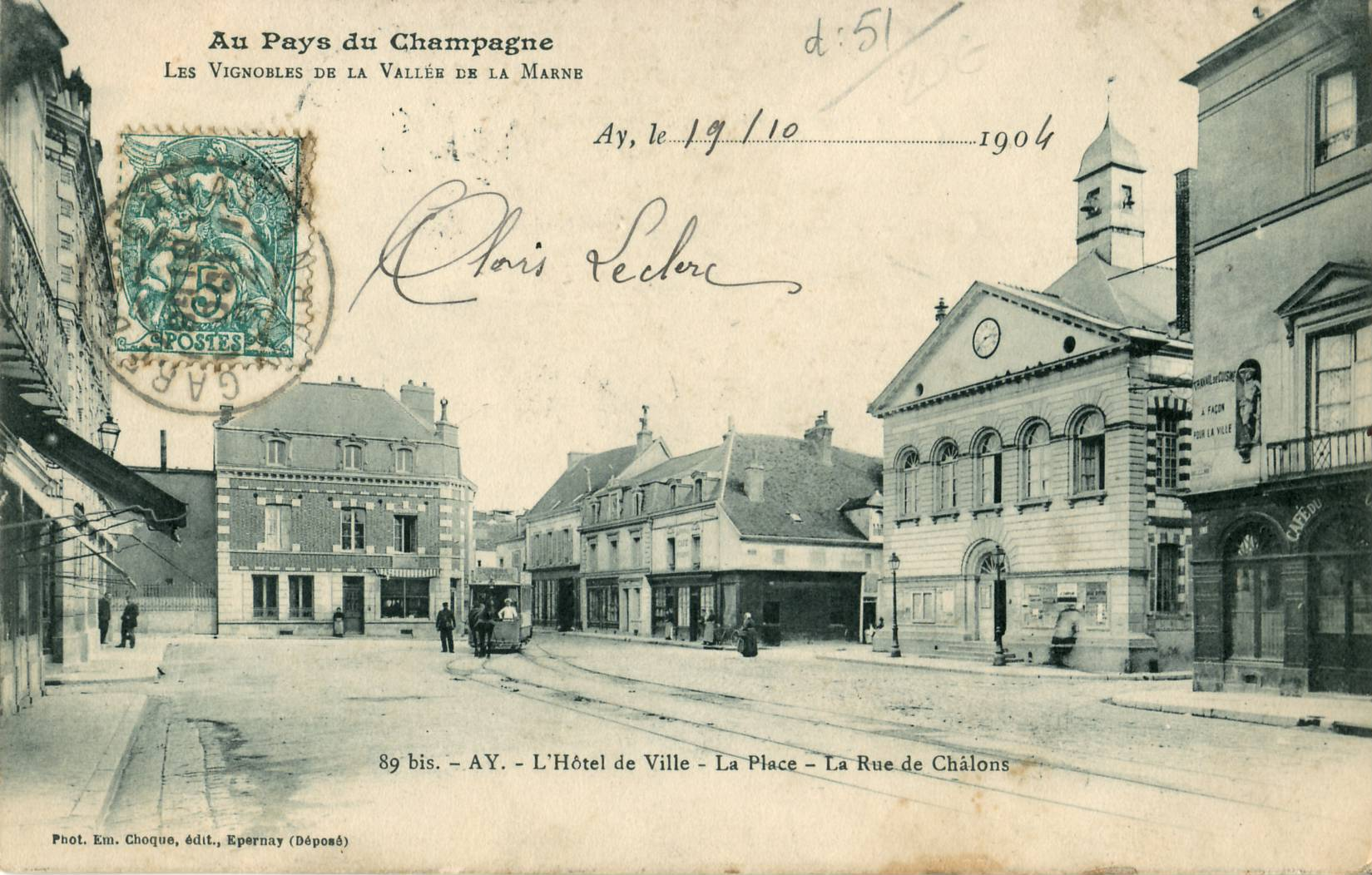 Carte postale ancienne éditée par Em. Choque à Epernay, collection Au pays du Vignoble, n°89 bis :AY - L'Hôtel de Ville - La Place - La rue de Châlons